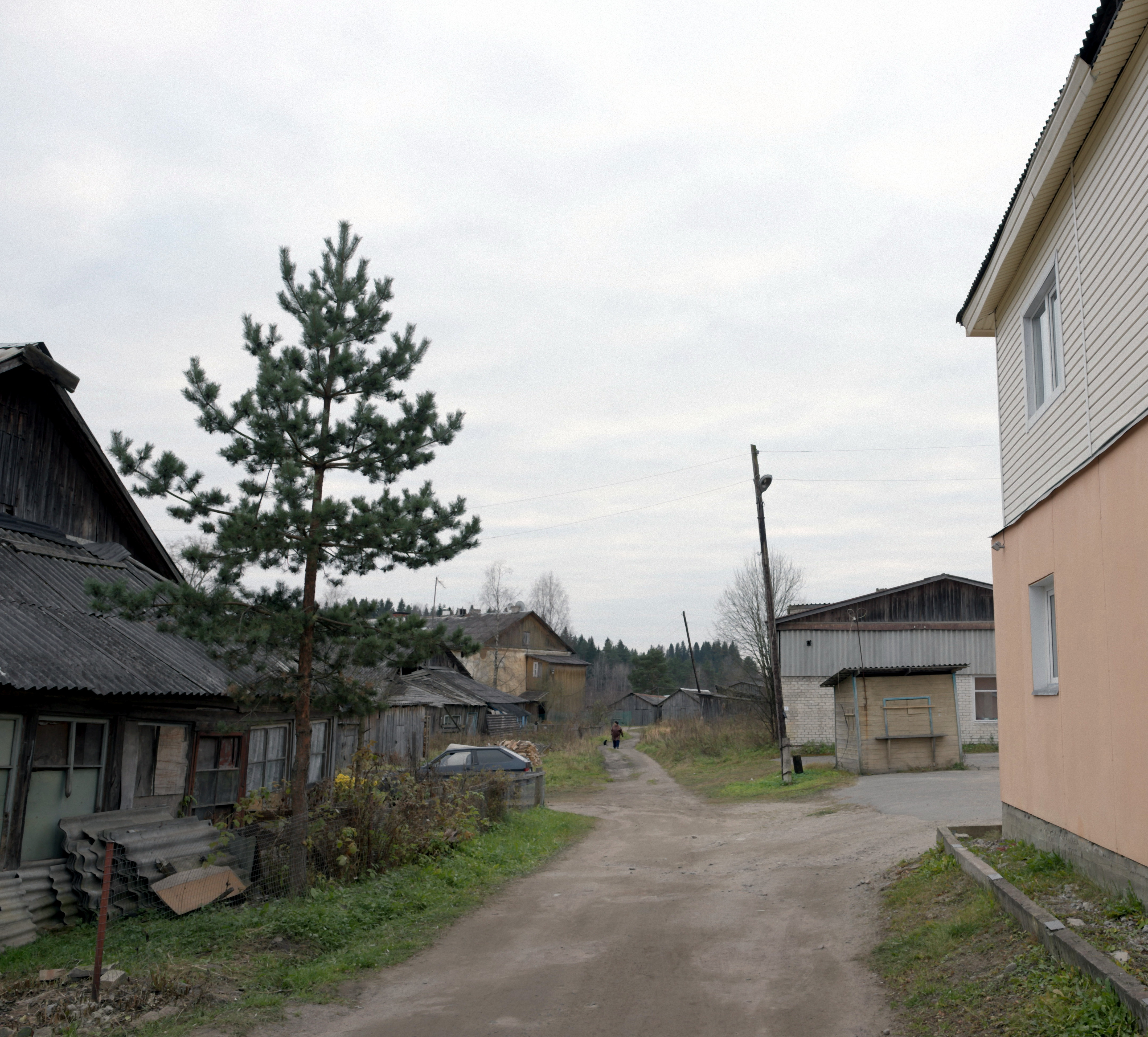 Hiitola (Хи́йтола) October 23rd 2016